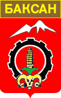 Герб. г.Баксан